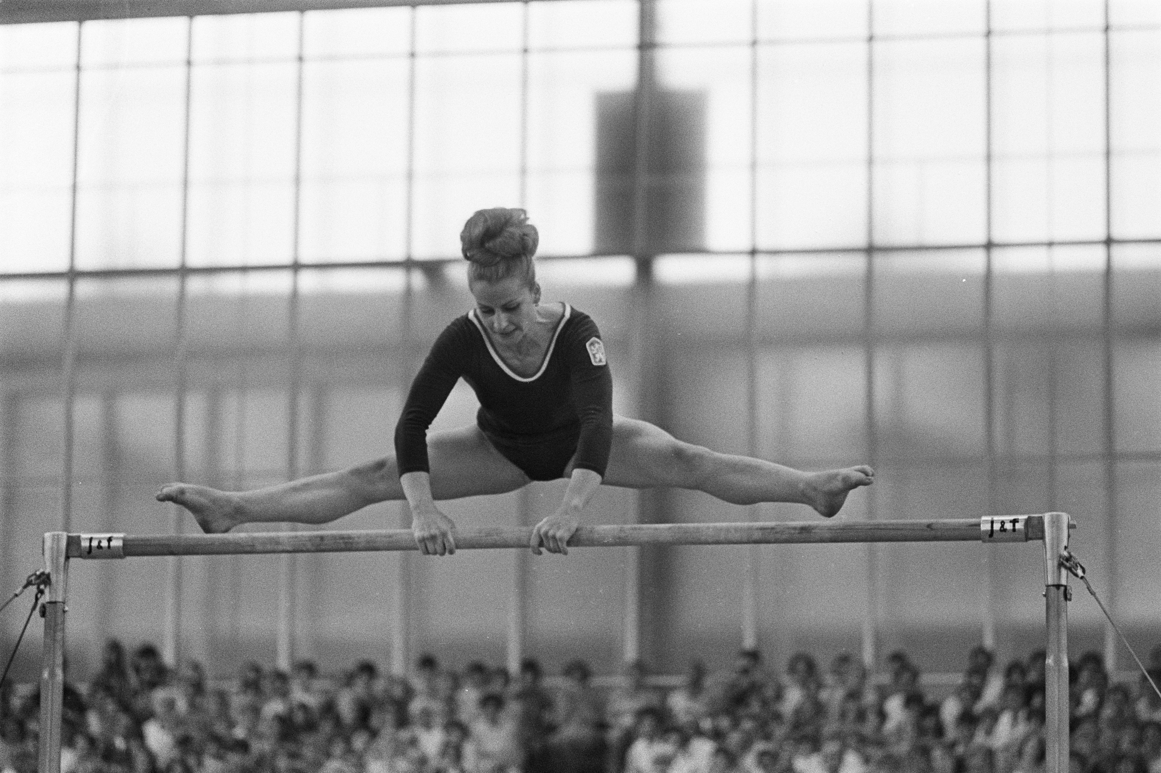 Collectie / Archief : Fotocollectie Anefo Reportage / Serie : [ onbekend ] Beschrijving : Europese turnkampioenschappen, Vera Caslavska aan de brug Datum : 28 mei 1967 Trefwoorden : kampioenschappen, turnen Persoonsnaam : Caslavska, Vera Fotograaf : Kroon, Ron / Anefo Auteursrechthebbende : Nationaal Archief Materiaalsoort : Negatief (zwart/wit) Nummer archiefinventaris : bekijk toegang 2.24.01.05 Bestanddeelnummer : 920-3573